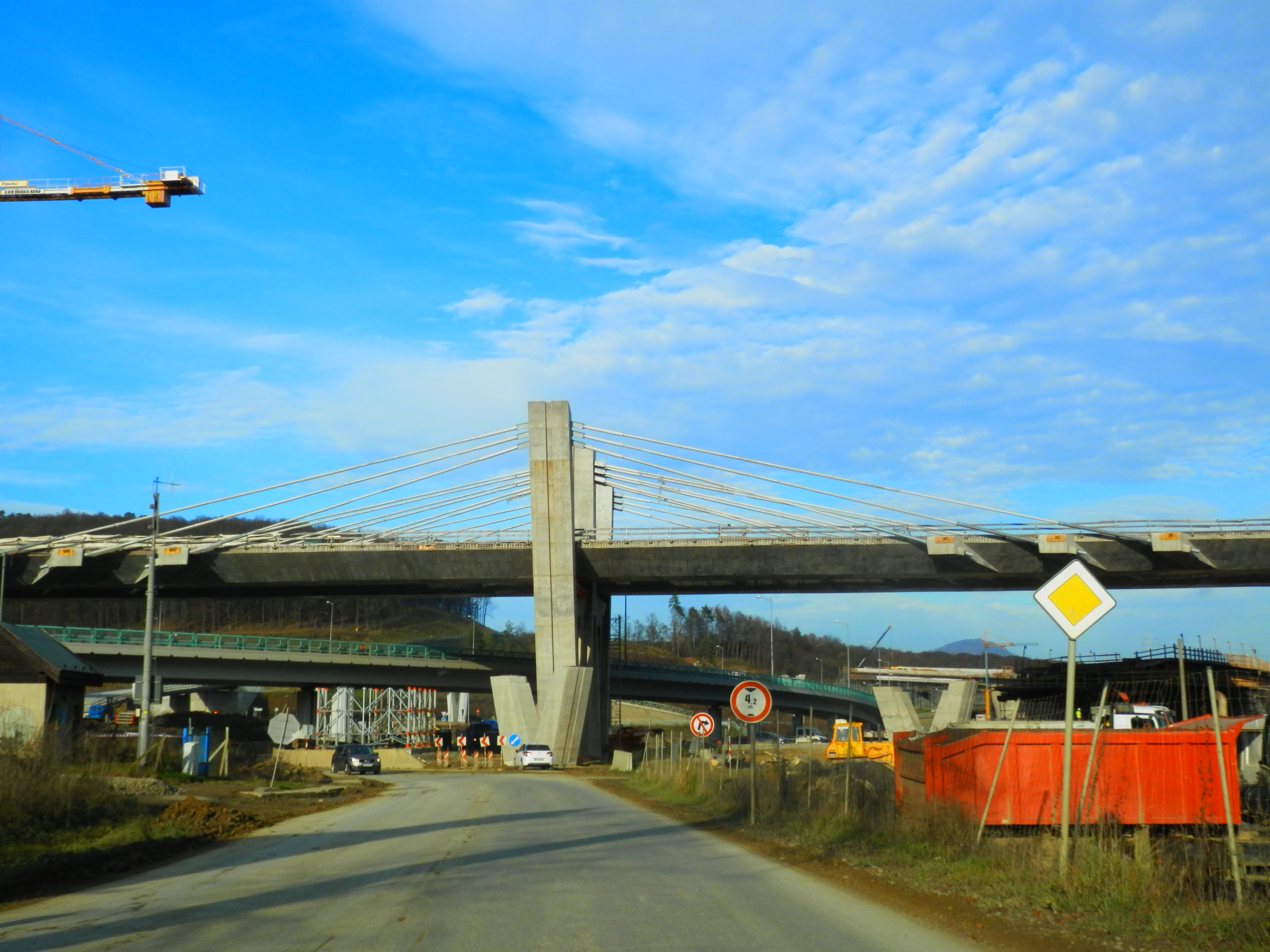 November 2019. Výstavba západného obchvatu diaľnice D1, mesto Prešov. Slovensko.